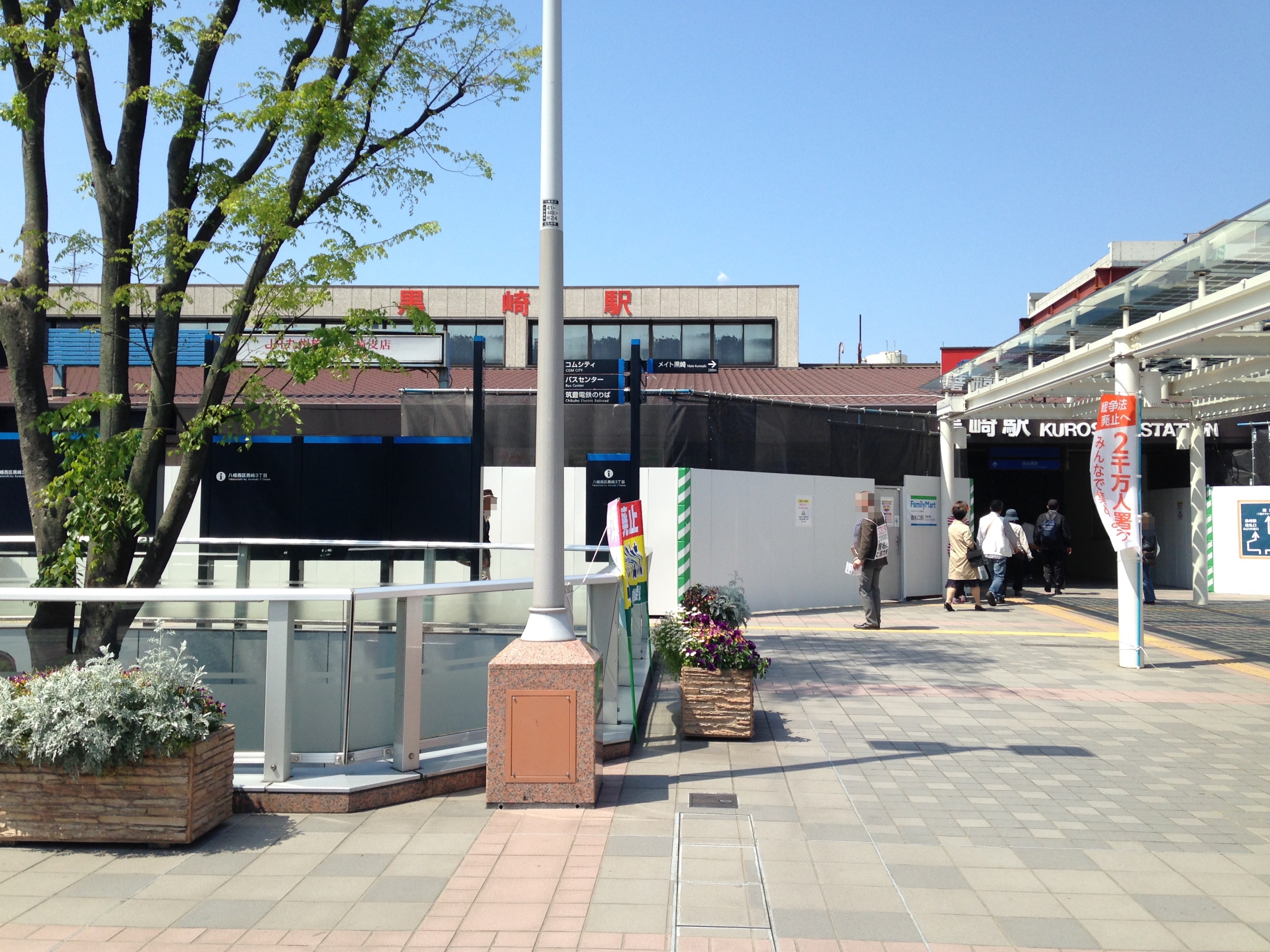 黒崎駅南口